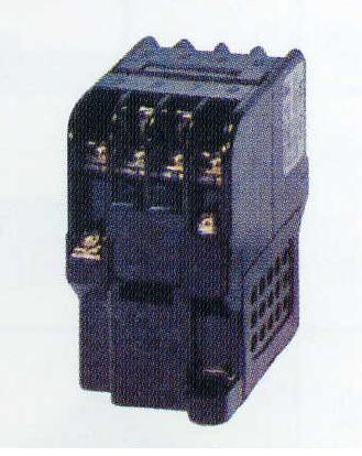 電磁接觸器外觀